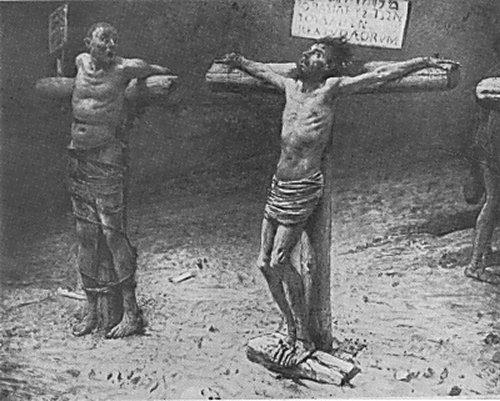 Распятие